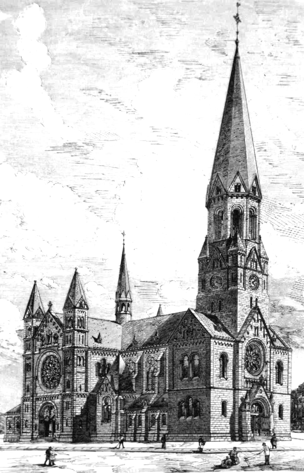 Katholische Garnisonkirche in Berlin-Kreuzberg. Heutige Johannes-Basilika Berlin-Neukölln. Wettbewerbsentwurf von August Menken 1892.